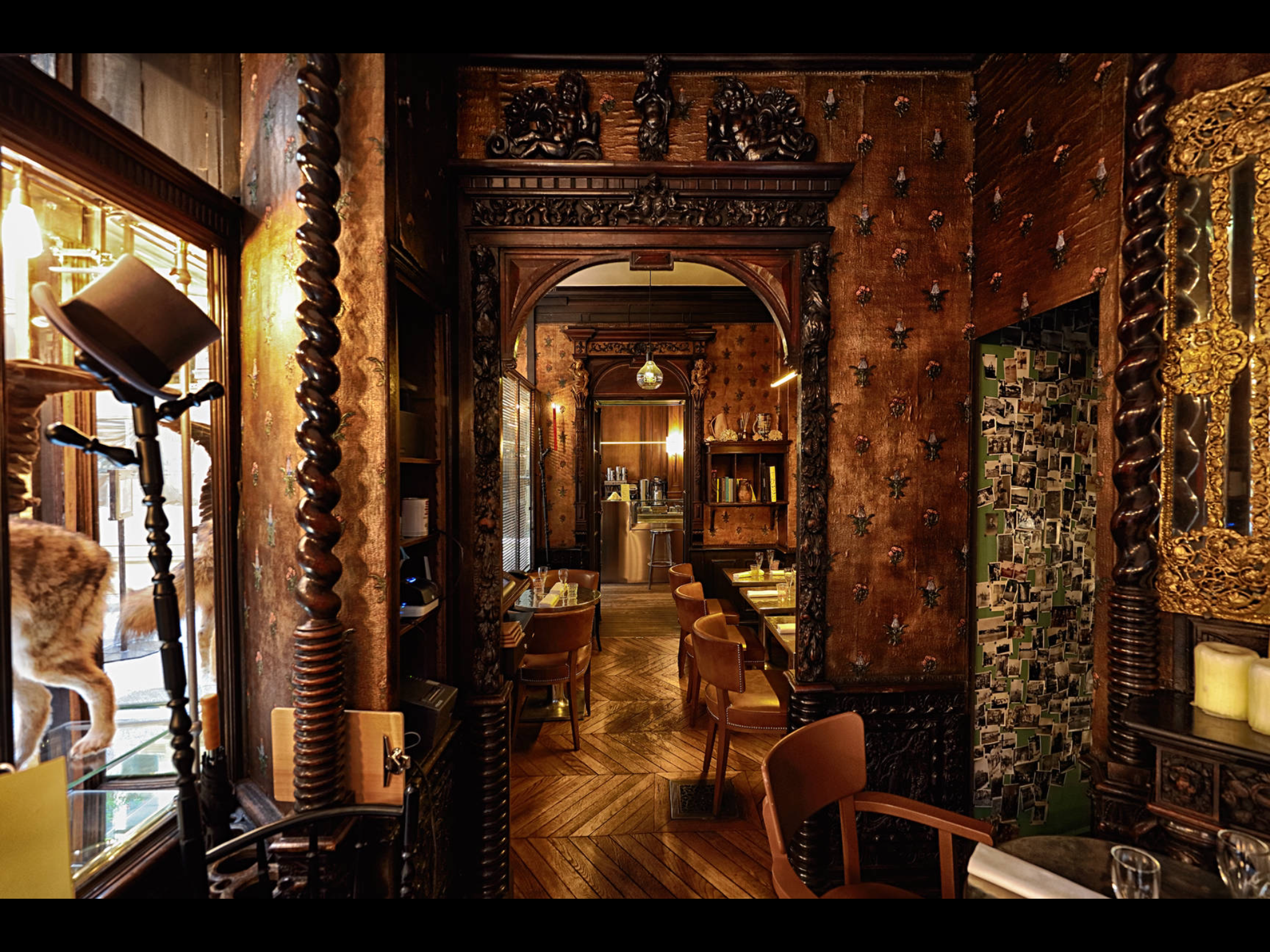 Le restaurant monument historique Caffè Stern dans le passage des Panoramas à Paris 2è